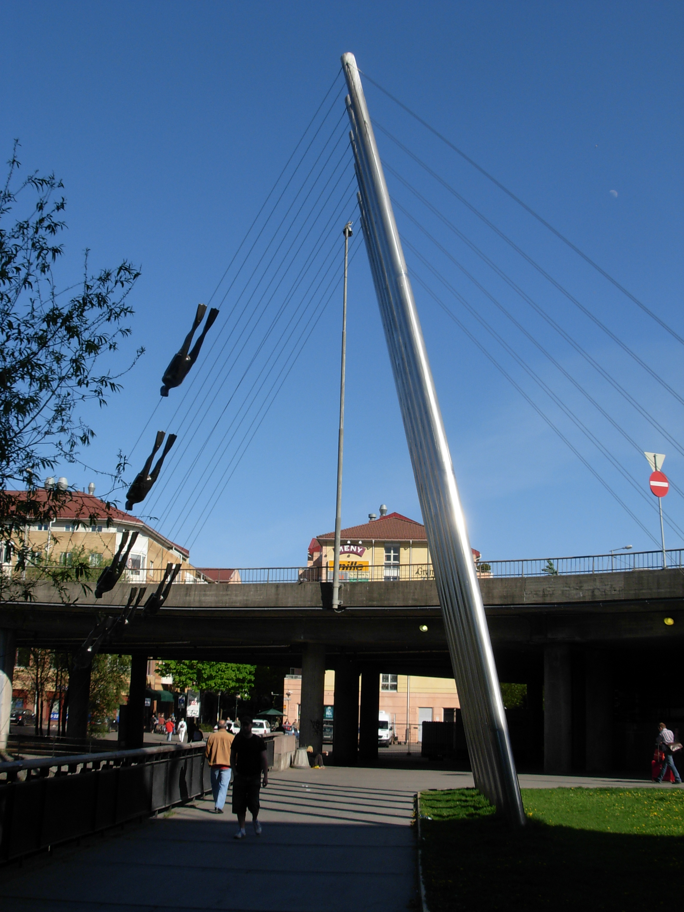 Vaterlandsparken, bridge to Grønland